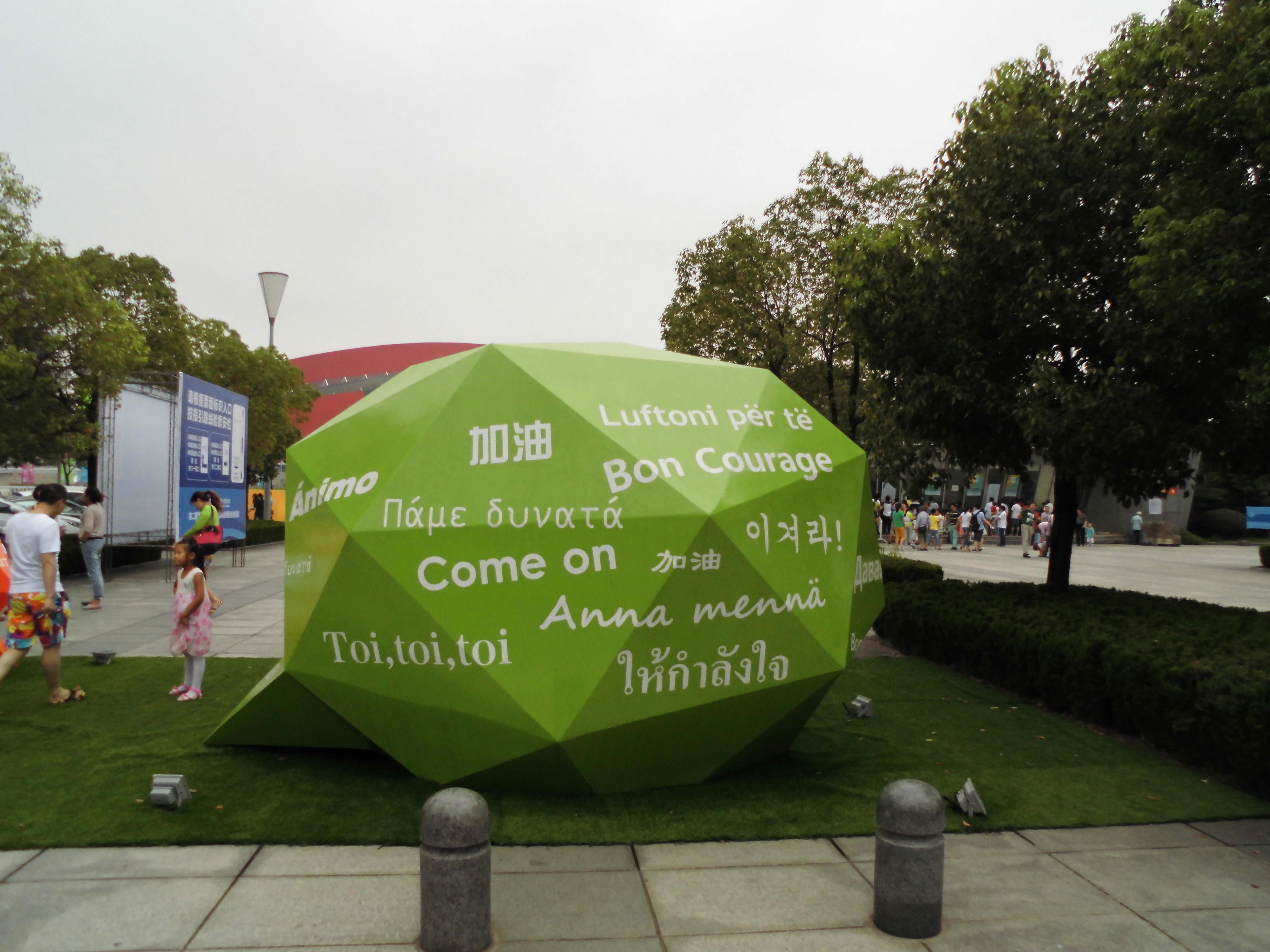 奥体中心门口多国语言“加油”